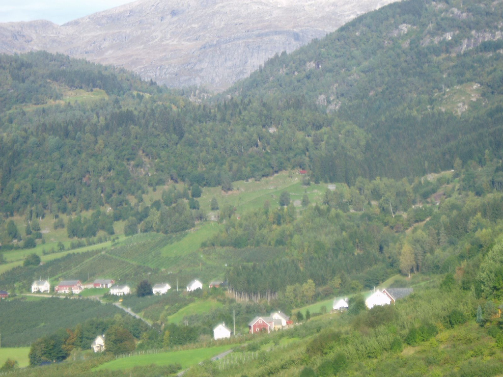 Gardane Torblå og Lekve. Frukthagar med opnare beitemark over.